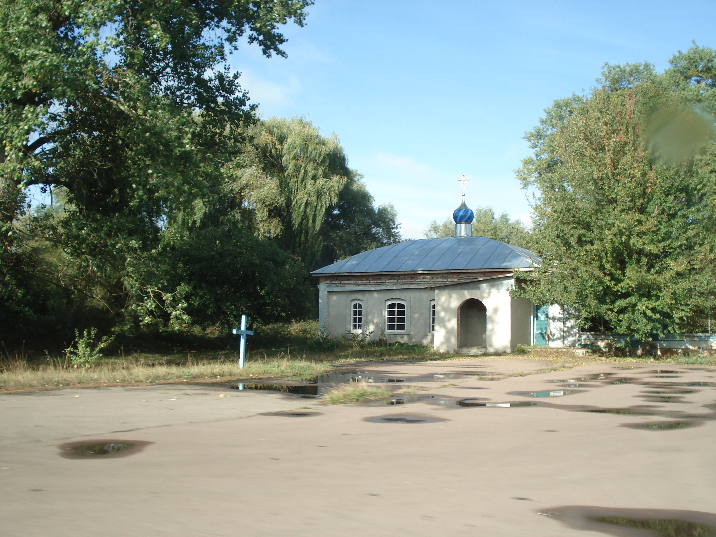 Ильинская церковь в селе Великий Круполь Згуровского района Киевской области после реконструкции